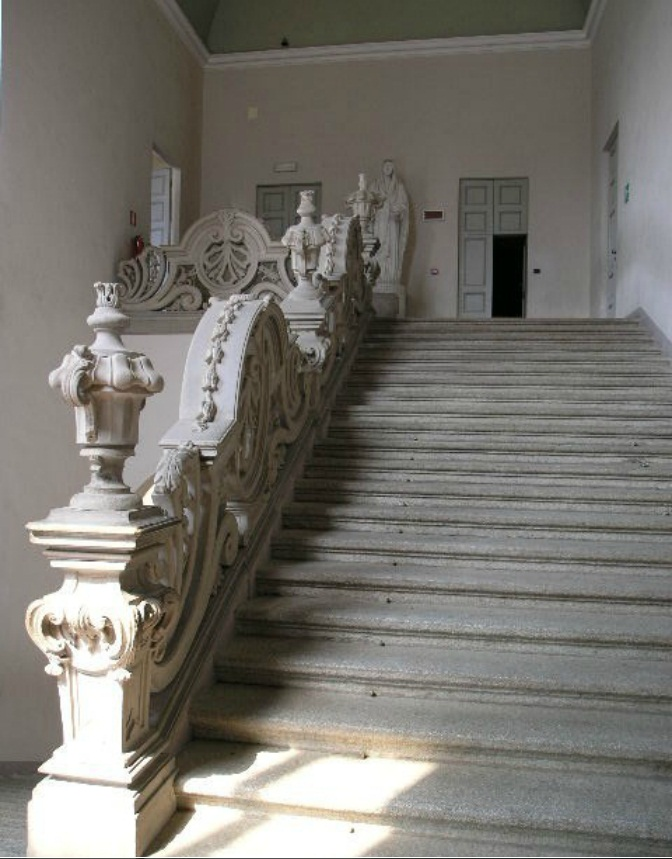 Scalone interno di Palazzo Brentano a Corbetta (MI) - Italia